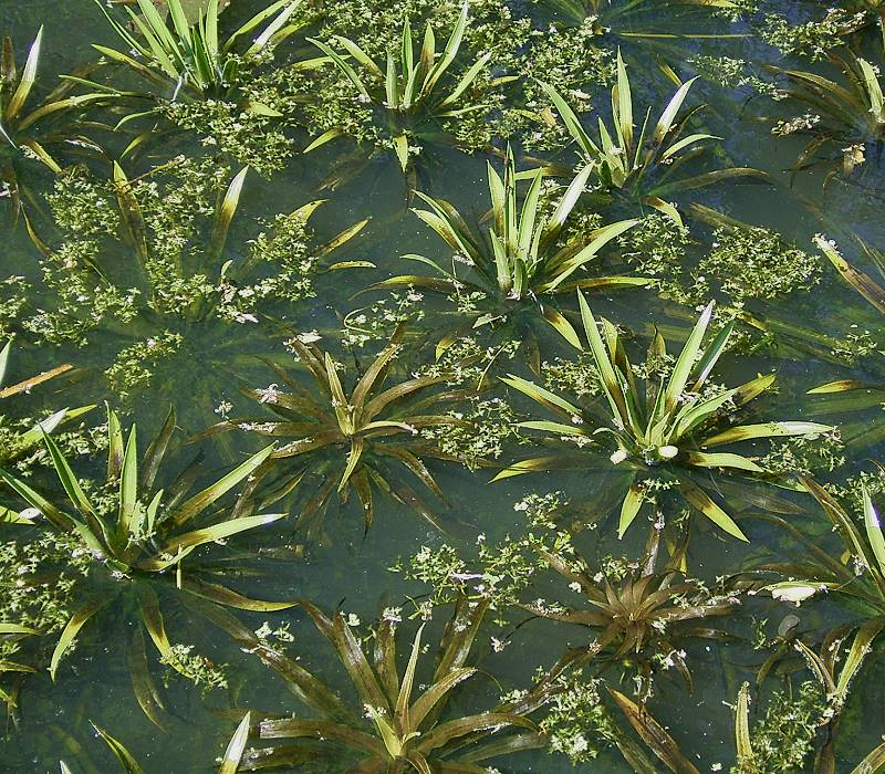 Stratiotes aloides